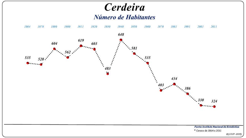 População